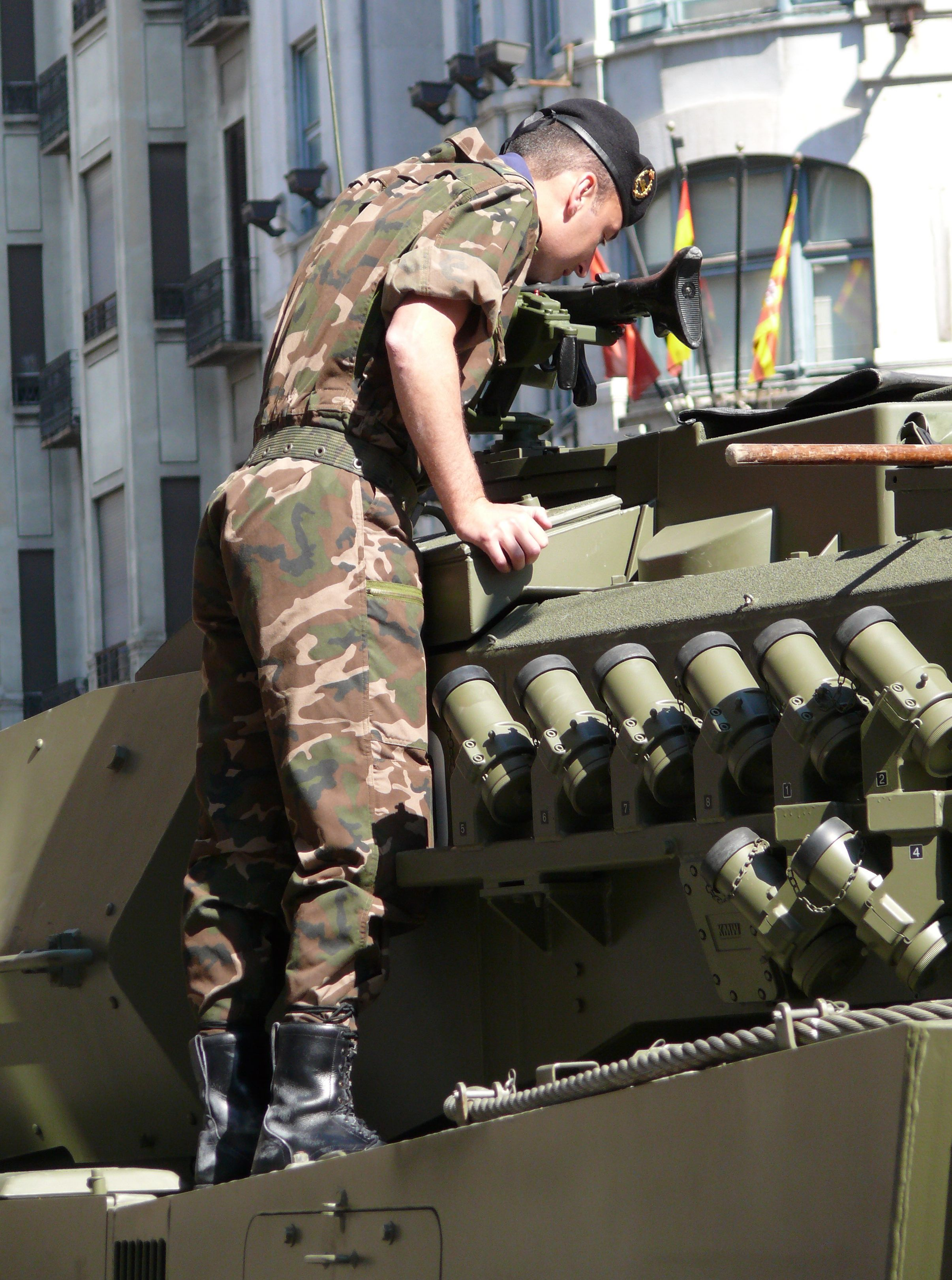 Leopardo 2E del Ejército de Tierra de España en el desfile del día de las Fuerzas Armadas de España del 2008 en Zaragoza.